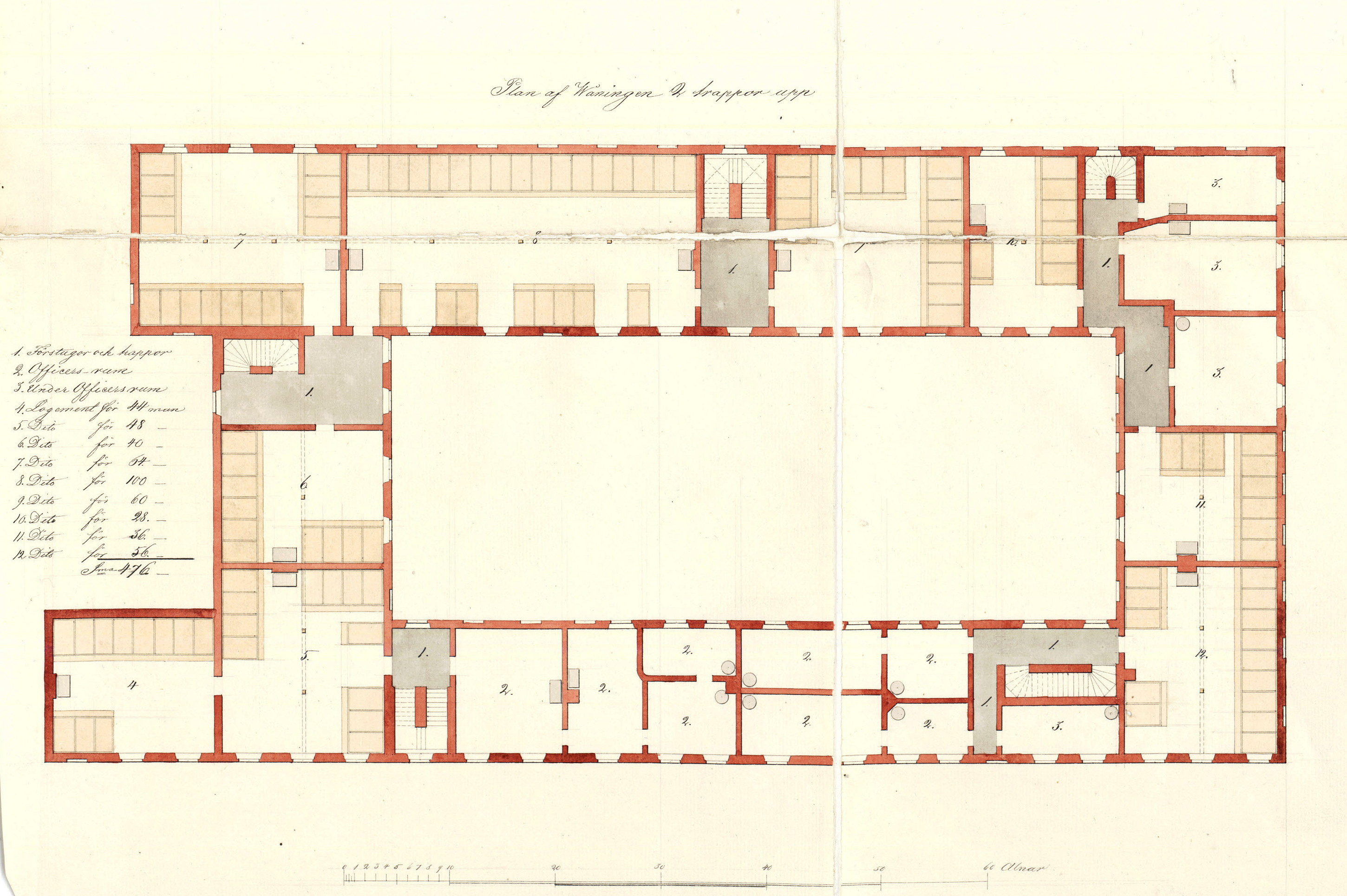 Ritning för ombyggnad av Sifwertska kasernen